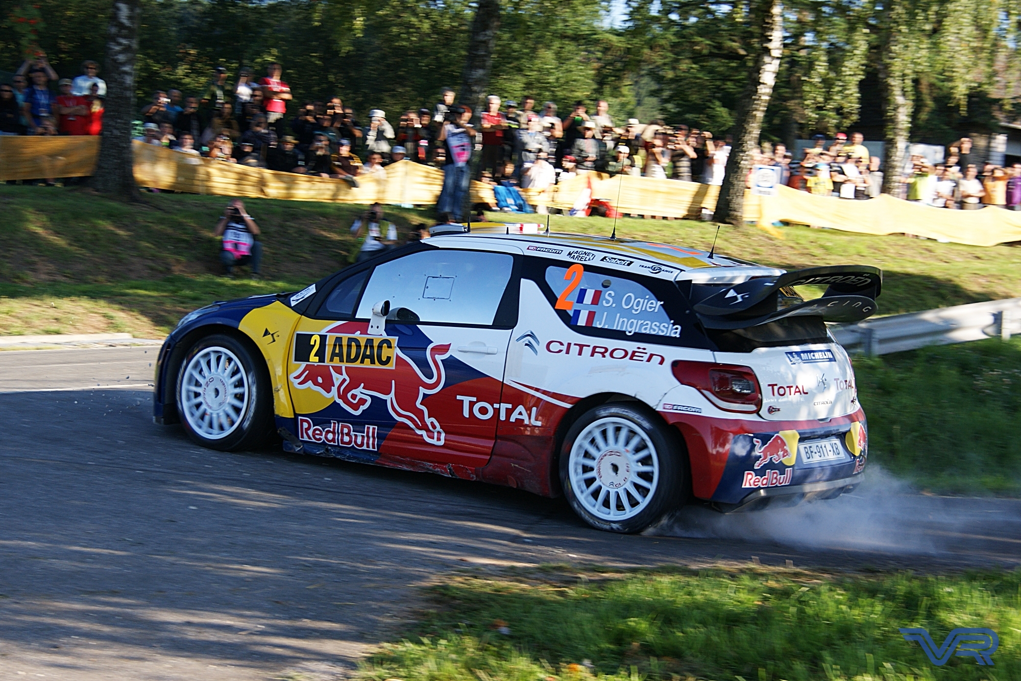 Sébastien Ogier podczas rajdu Niemiec 2011